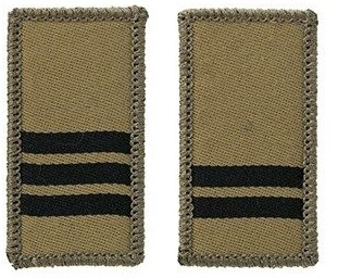 Grade Abzeichen ZSO Kdo